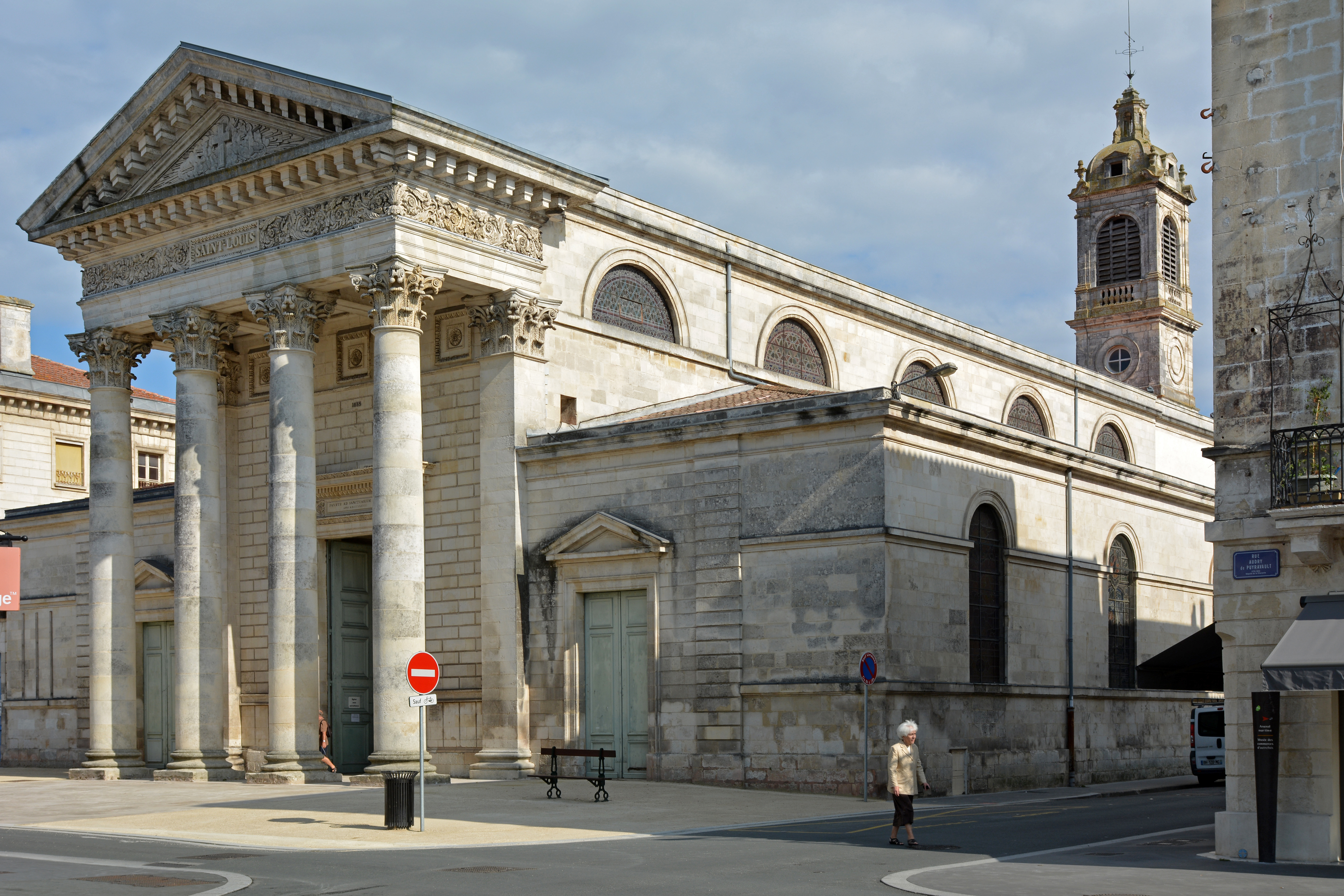 Eglise Saint-Louis a Rochefort, Charente-Maritime, France